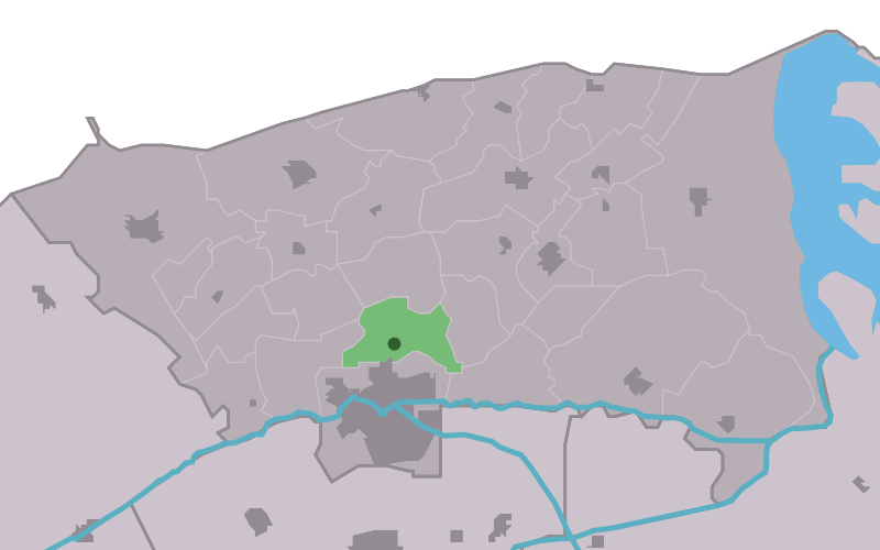 Kaartsje fan himrik fan Ealsum